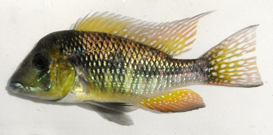 Gymnogeophagus peliochelynion, paratipo, macho, ZVC-P 13210, 76.3 mm de largo estándar, río Arapey, Colonia Lavalleja, Paso Elías, Salto, Uruguay